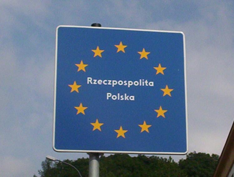 Sinal "República da Polônia" na fronteira em Cieszyn